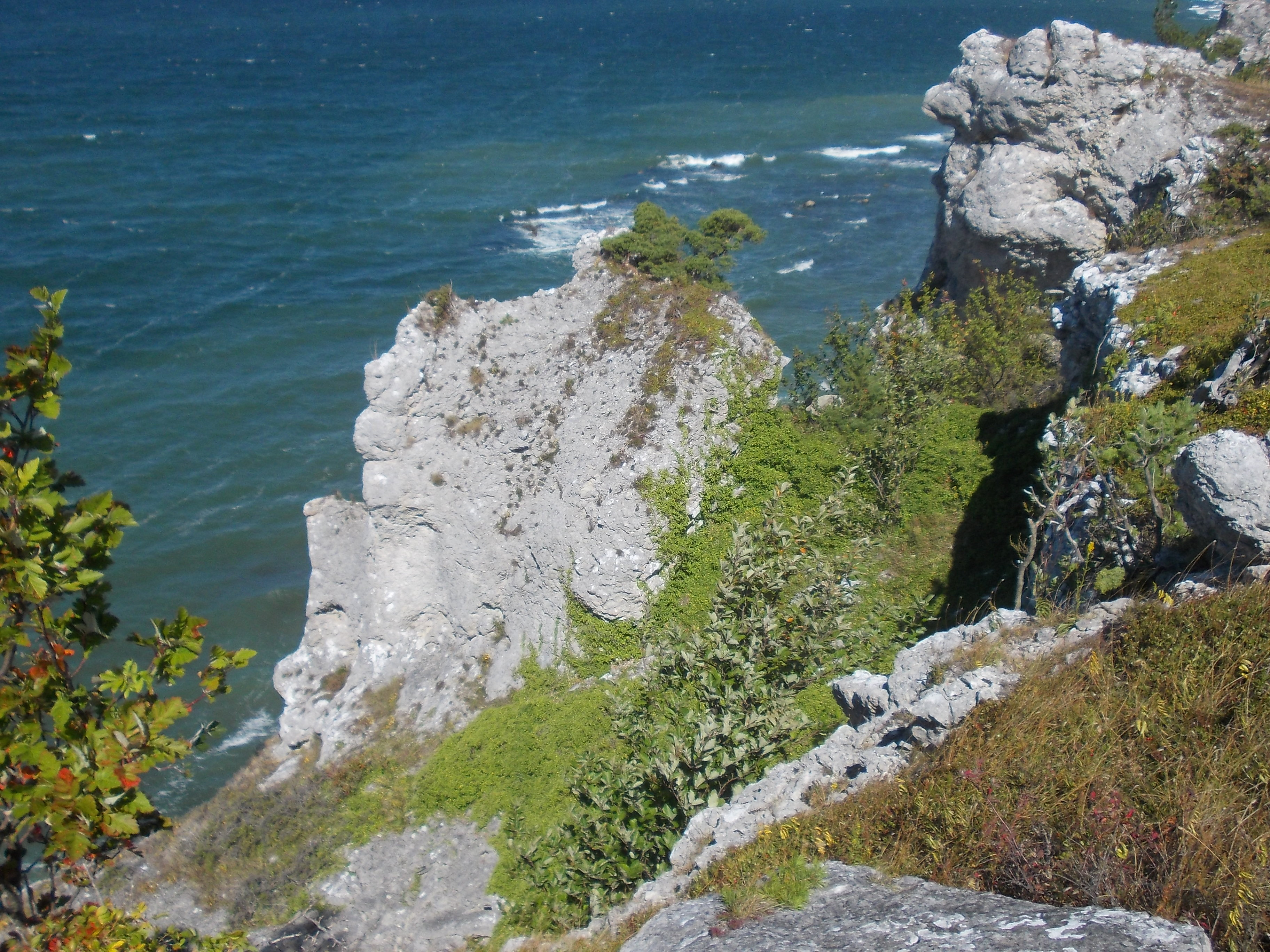 Klinten Svarthäll och Sigsarve strand ingår i Hall-Hangvars naturreservat.